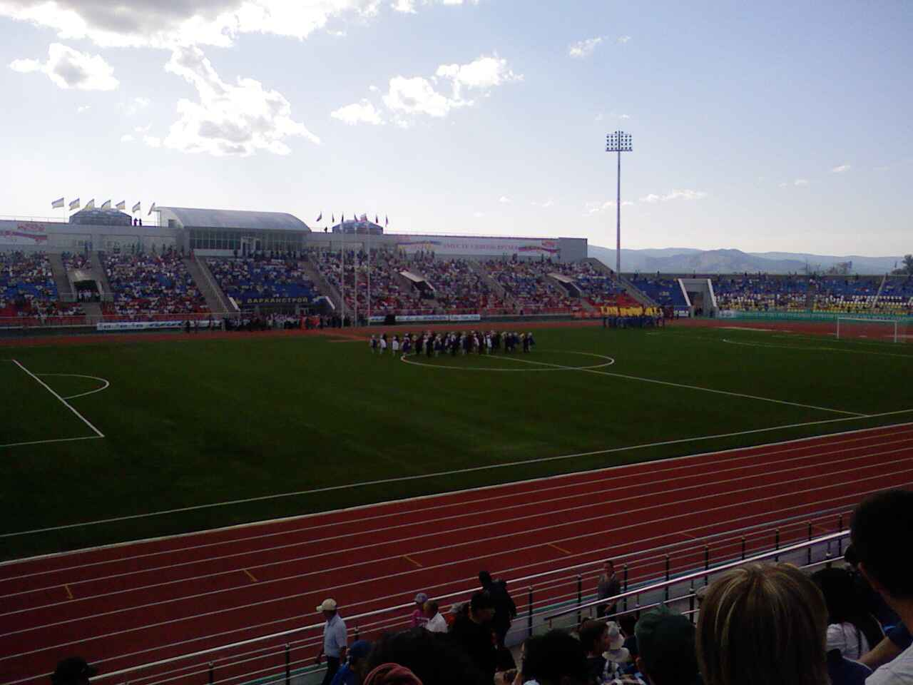 Центральный стадион республики Бурятия